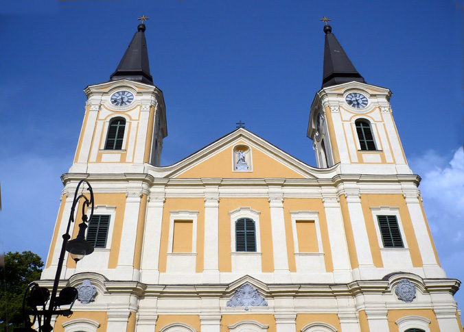 preĝejo Mario Magdaleno en Zalaegerszeg.